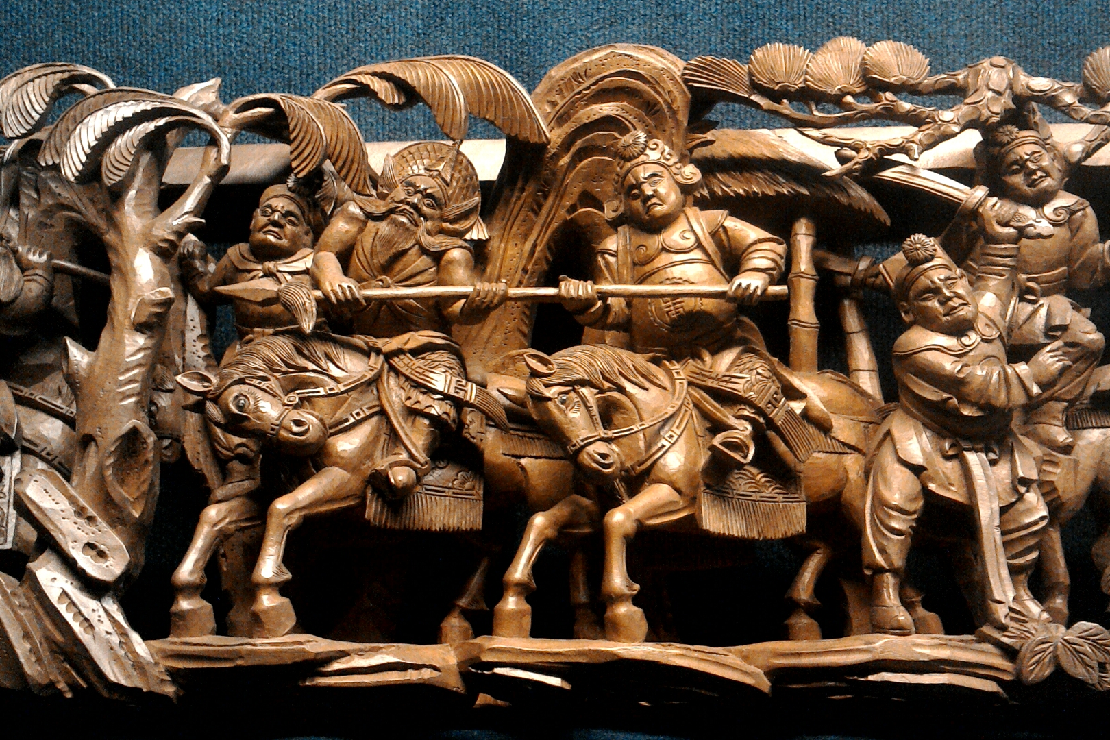 黃龜理「許褚裸衣戰馬超」木雕,新北市板橋區第二區忠翠里